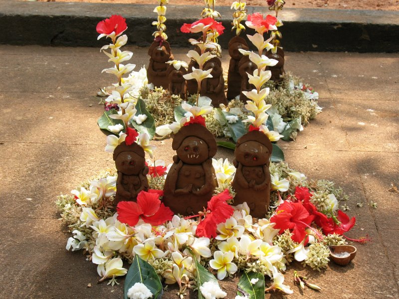 കാമൻ